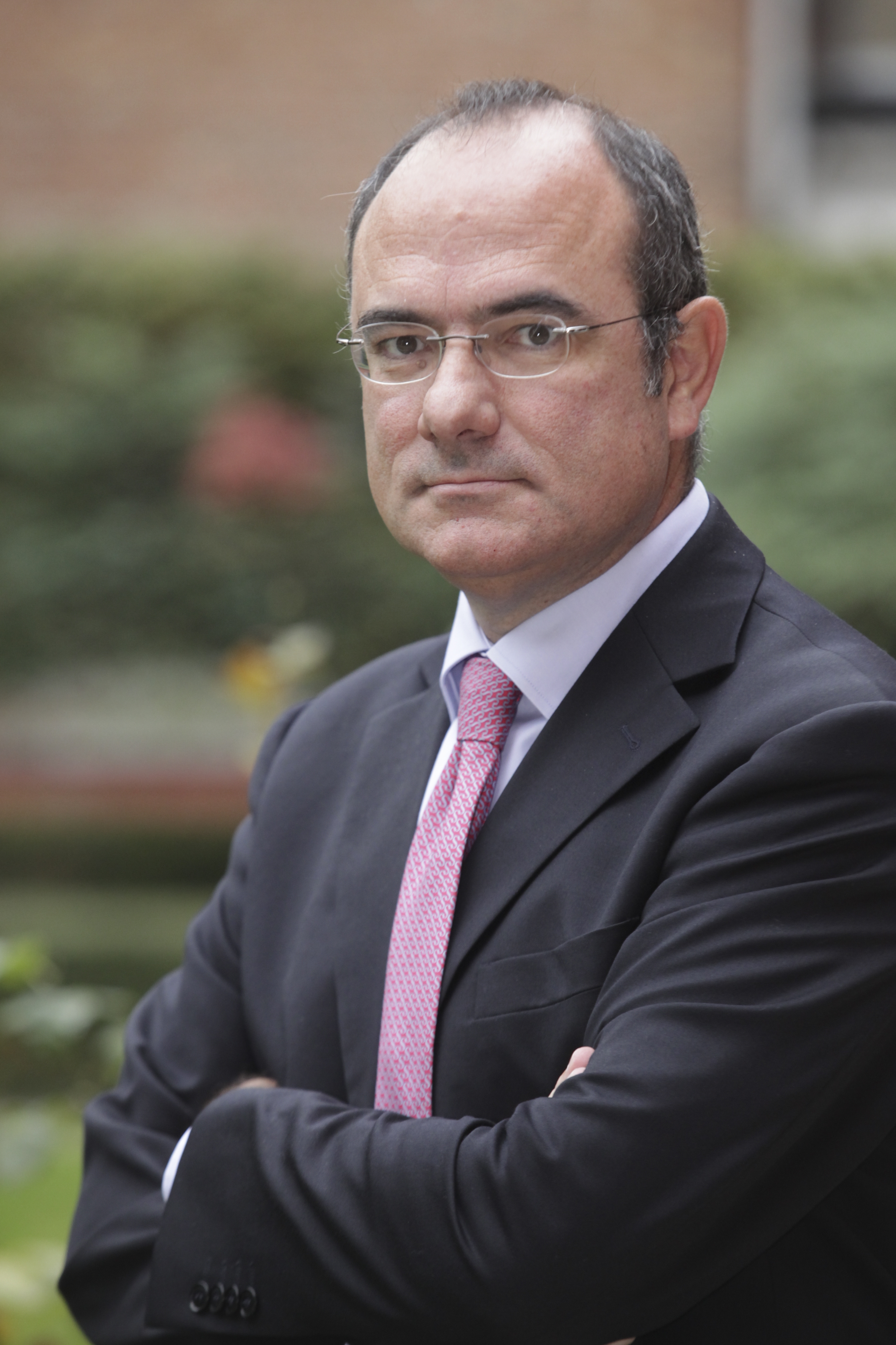 Jaume Duch, en 2015.